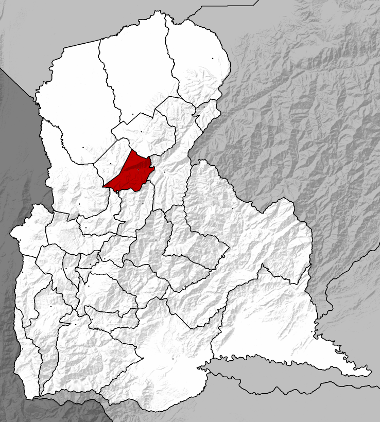 Municipio Seboruco - Táchira